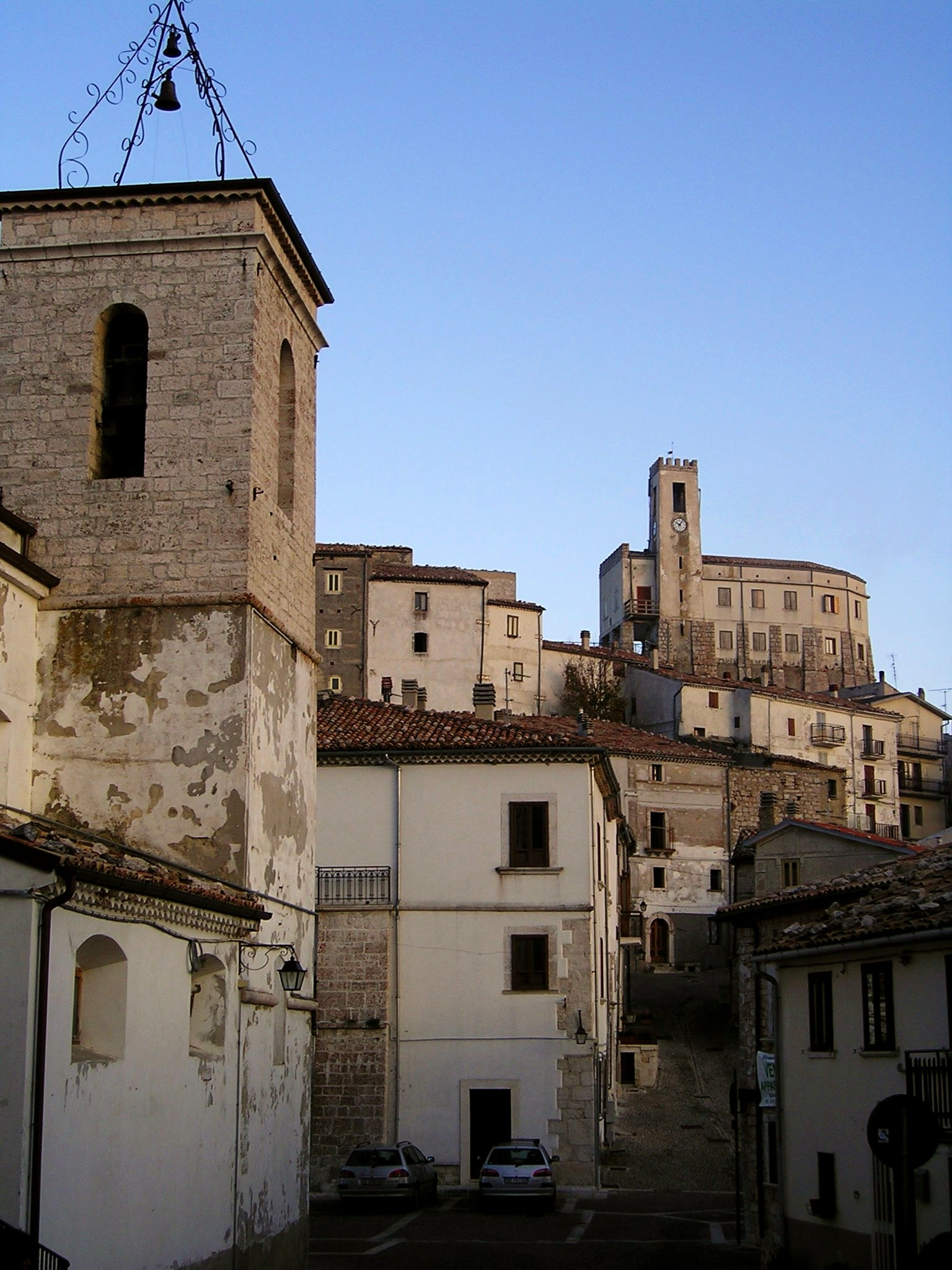 Gamberale